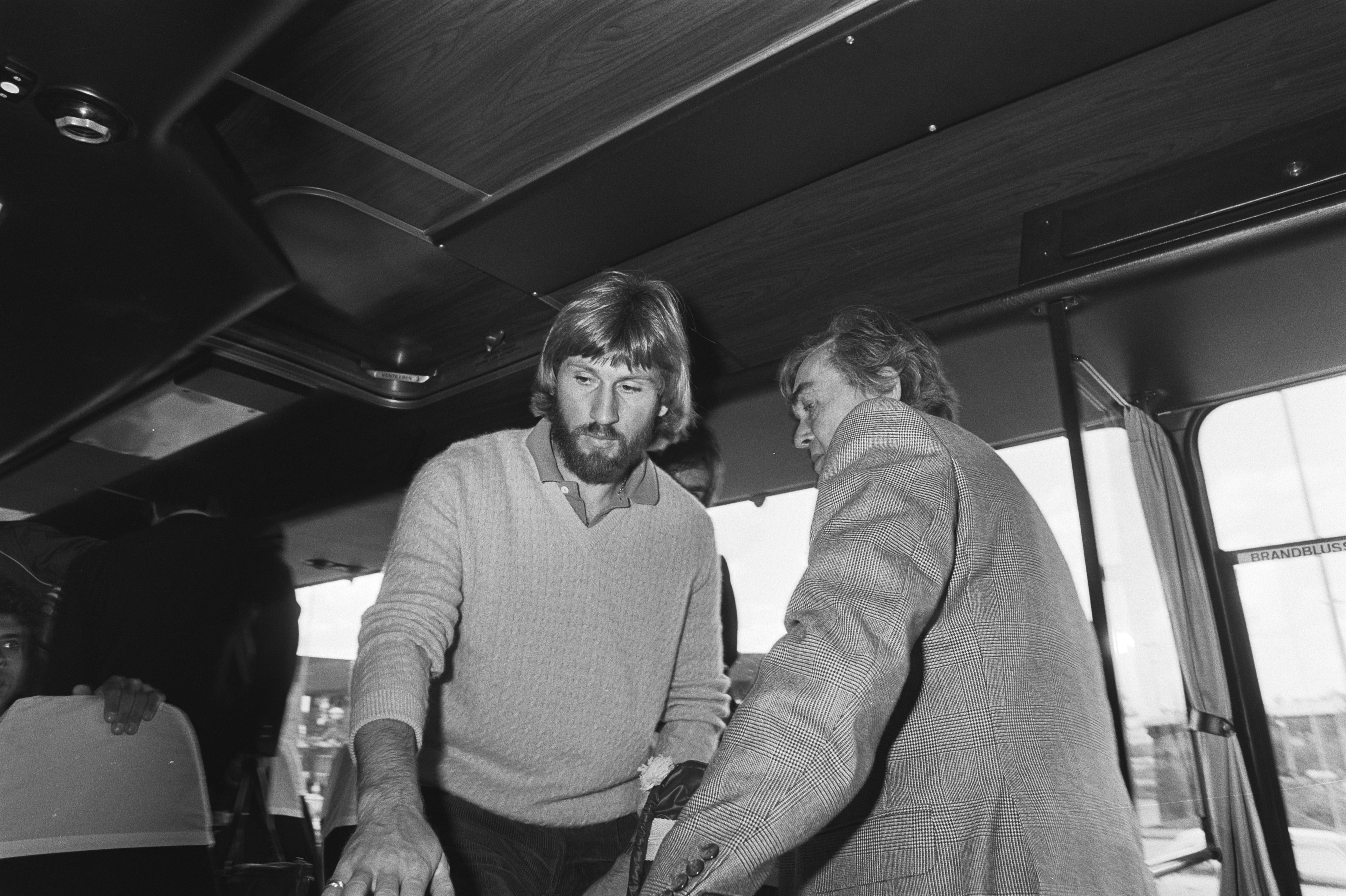 Collectie / Archief : Fotocollectie Anefo Reportage / Serie : Aankomst HSV Hamburg op Schiphol in verband met Europa Cup III wedstrijd Beschrijving : Trainer Ernst Happel met (links) Manfred Kaltz Annotatie : Op doorreis naar Athene waar de finale tegen Juventus zou plaatsvinden Datum : 29 september 1981 Locatie : Noord-Holland, Schiphol Trefwoorden : trainers, voetballers Persoonsnaam : Happel, Ernst, Kaltz, Manfred Fotograaf : Antonisse, Marcel / Anefo Auteursrechthebbende : Nationaal Archief Materiaalsoort : Negatief (zwart/wit) Nummer archiefinventaris : bekijk toegang 2.24.01.05 Bestanddeelnummer : 931-7104